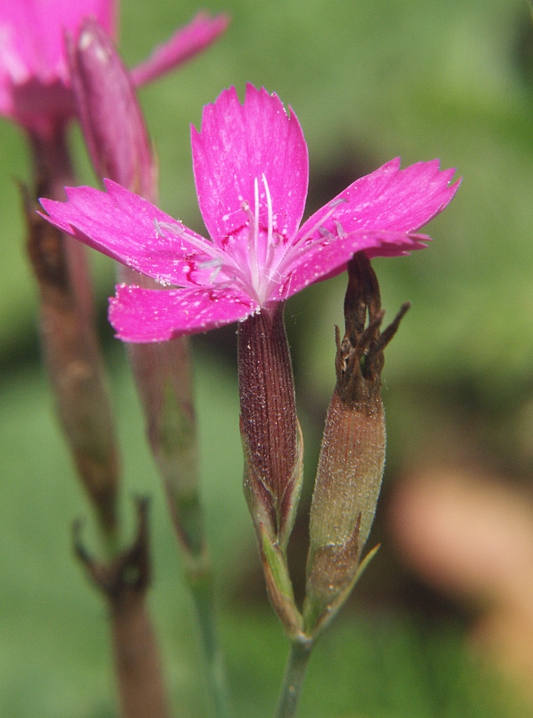 Dianthus deltoides, Frankenhöhe, Germany